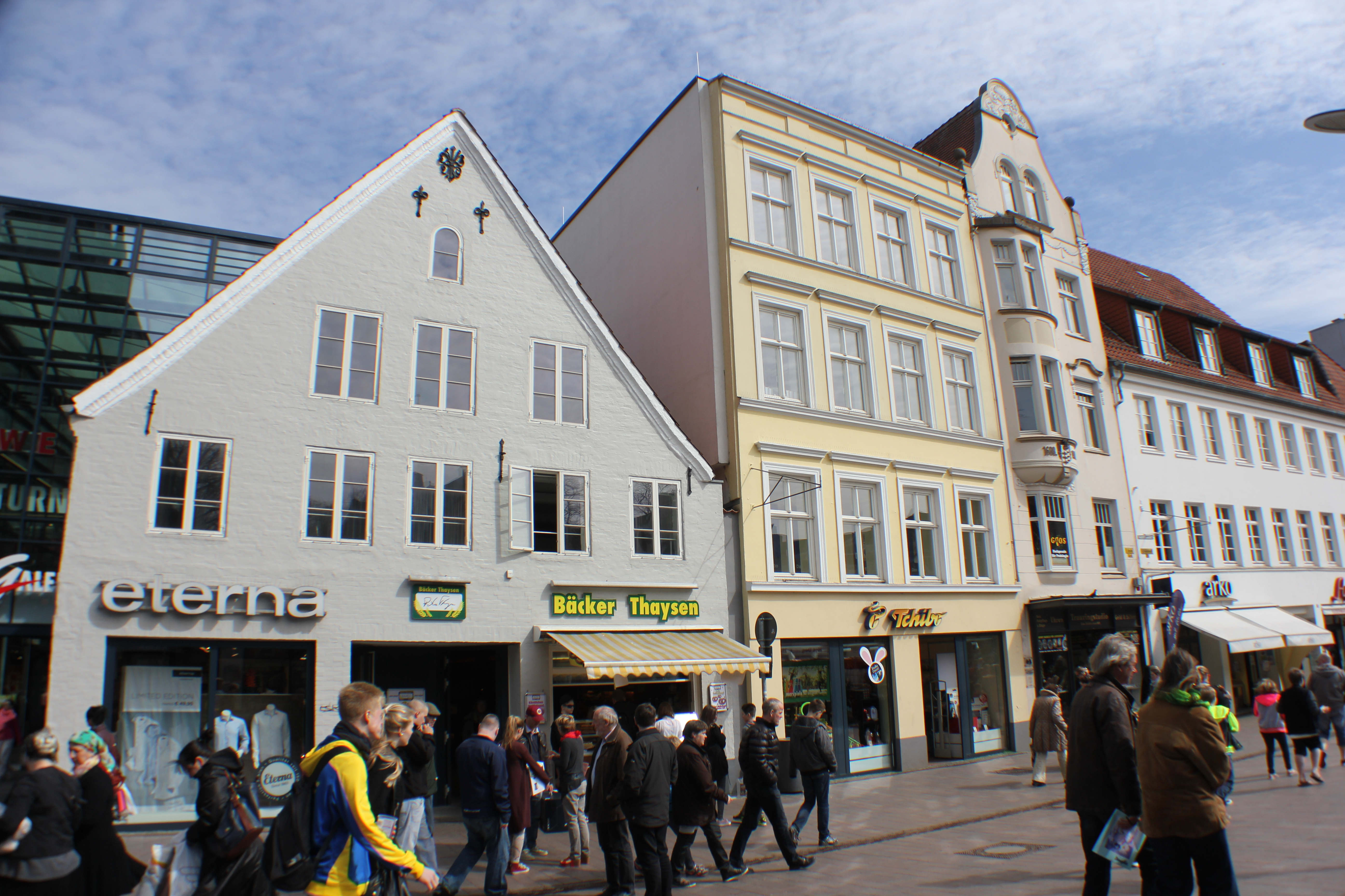 Flensburgs Holm, Das Straßenstück Katsund bzw Kattsund (Flensburg 2014), Bild 002